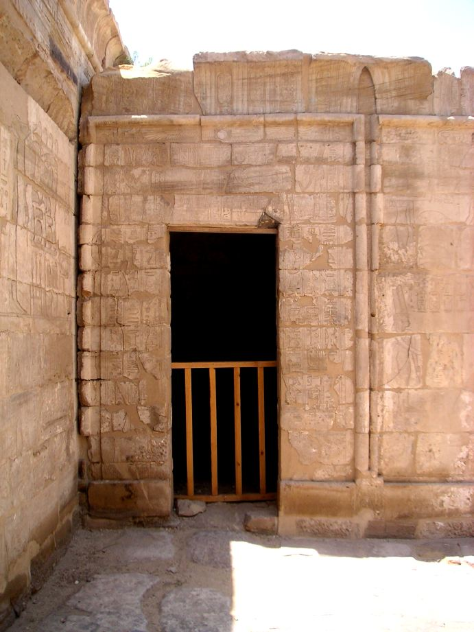 Vue de l'entrée de la chapelle funéraire de la divine adoratrice d'Amon Nitocris I - Médinet Habou - XXVIe dynastie égyptienne